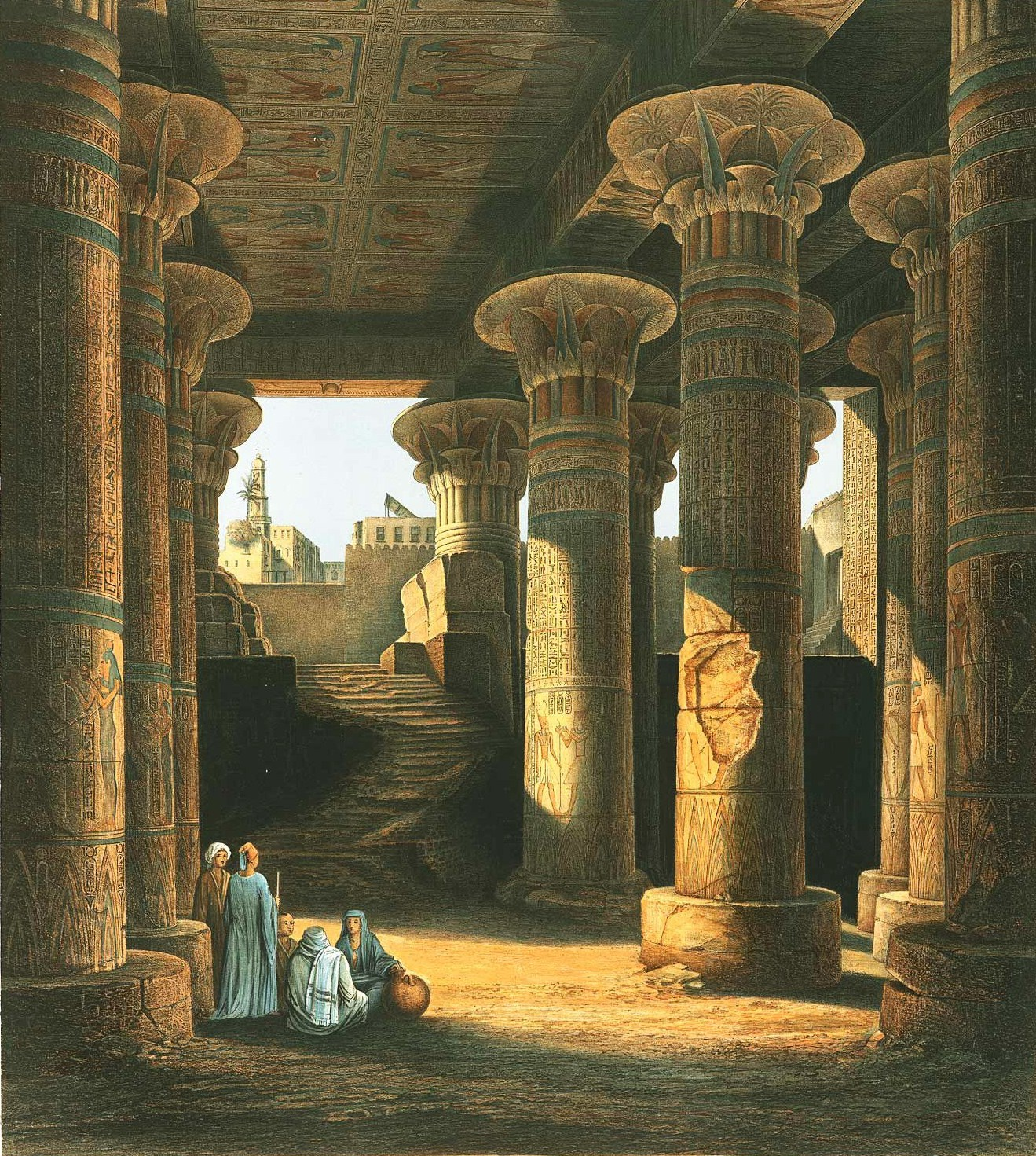 Denkmaeler aus Aegypten und Aethiopien nach den Zeichnungen der von Seiner Majestät dem Koenige von Preussen, Friedrich Wilhelm IV., nach diesen Ländern gesendeten, und in den Jahren 1842–1845 ausgeführten wissenschaftlichen Expedition auf Befehl Seiner Majestät